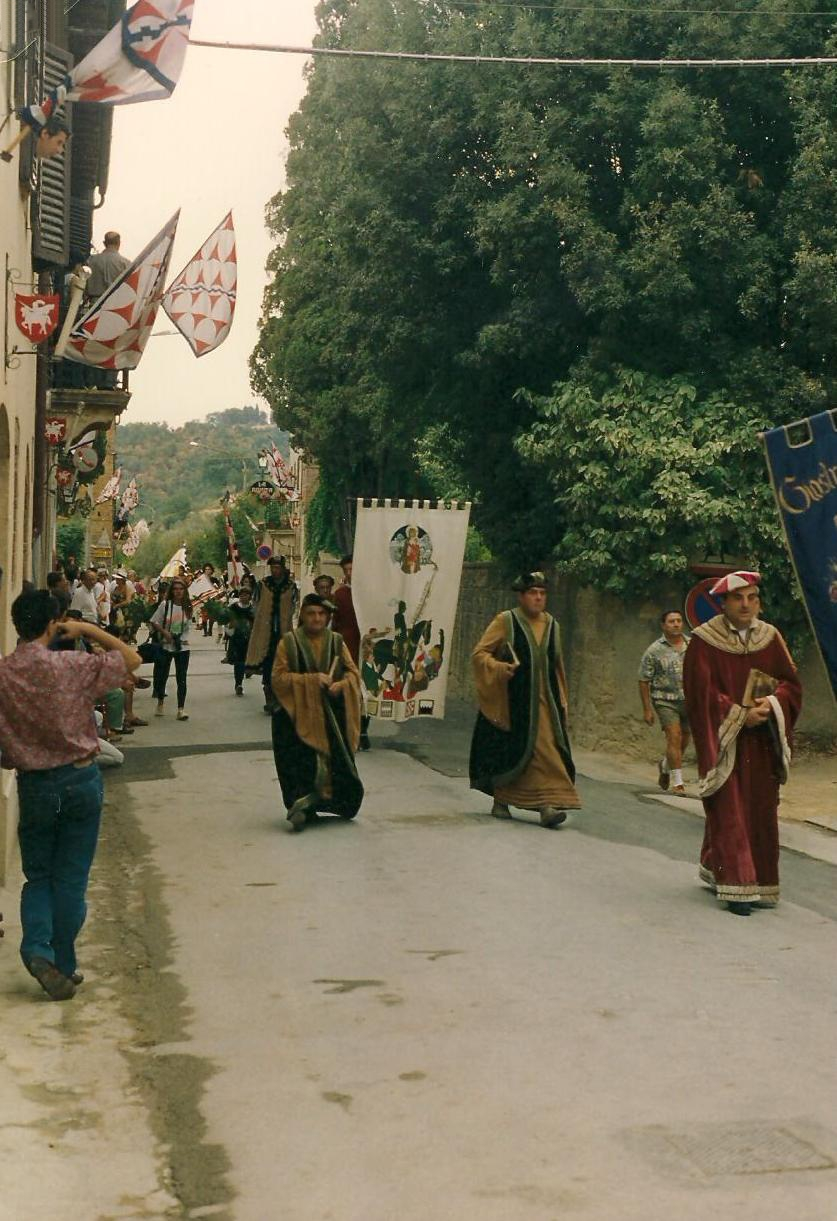 Il corteo storico della XXII edizione della Giostra di Simone di Montisi (1993).